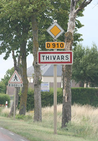 Thivars, Eure-et-Loir (France), 2006.